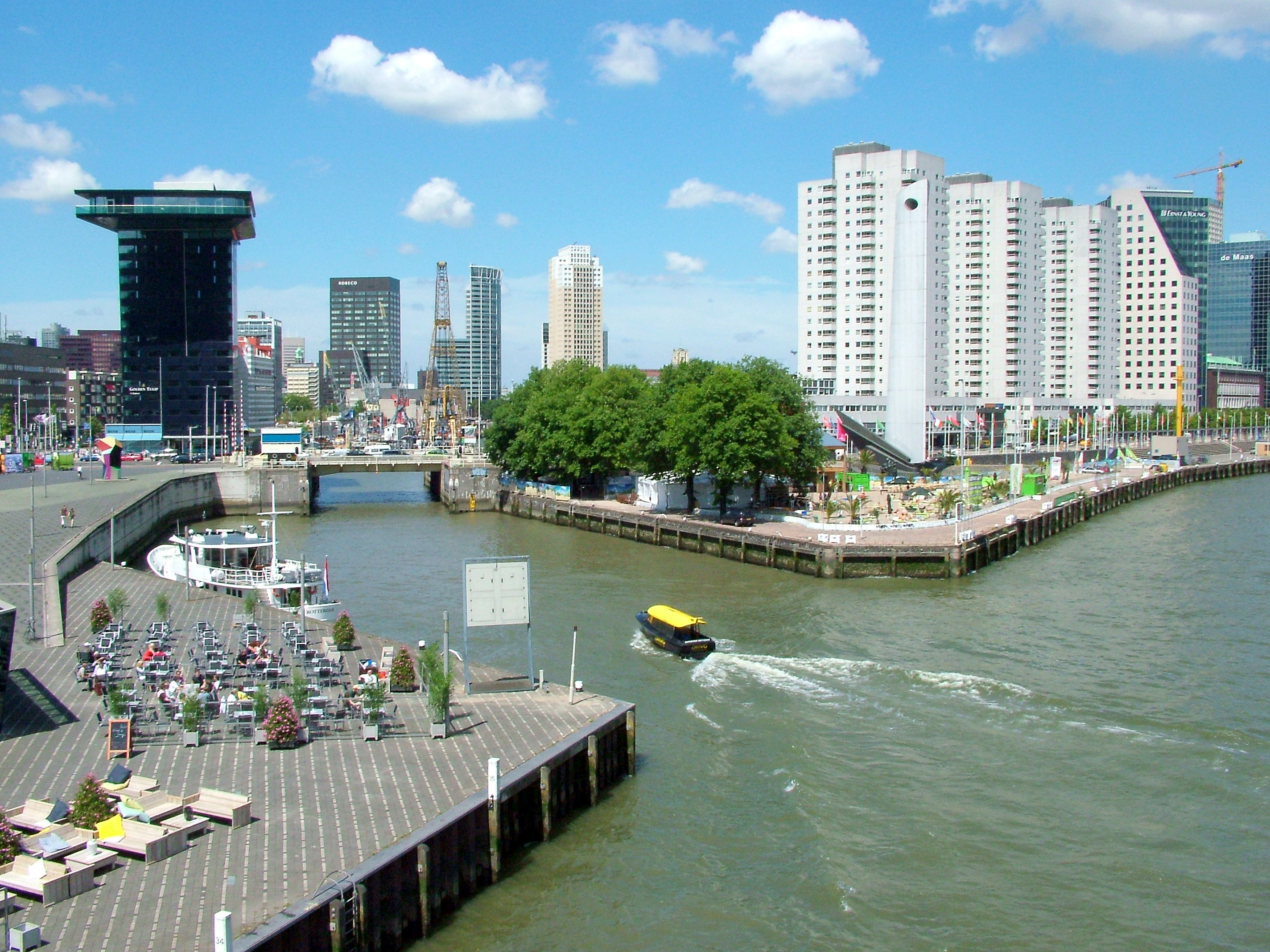 Rotterdam Zentrum, von Süden gesehen